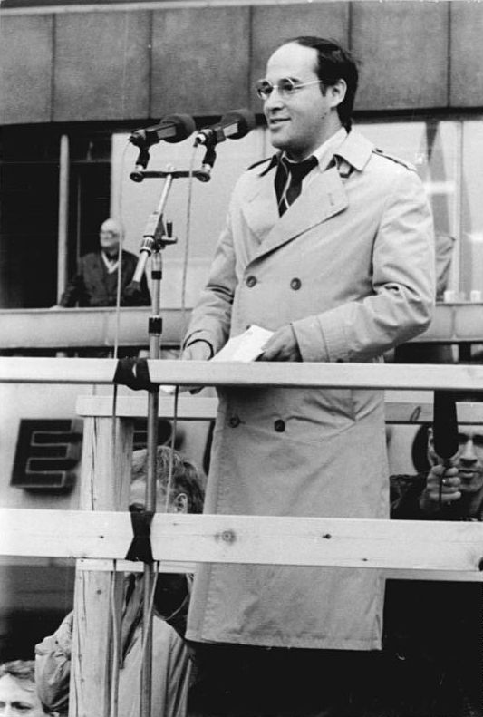 ADN-ZB Link 4.11.89 Berlin: Demonstration 500.000 Bürger beteiligten sich an einer Demonstration für den Inhalt der Artikel 27 und 28 der Verfassung der DDR. Auf dem anschließenden Meeting auf dem Alexanderplatz ergriff auch Rechtsanwalt Dr. Gregor Gysi das Wort.